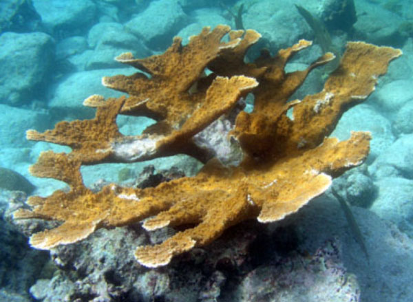 Acropora palmata tras 10 años de transplante en las islas Virgin, EE.UU.